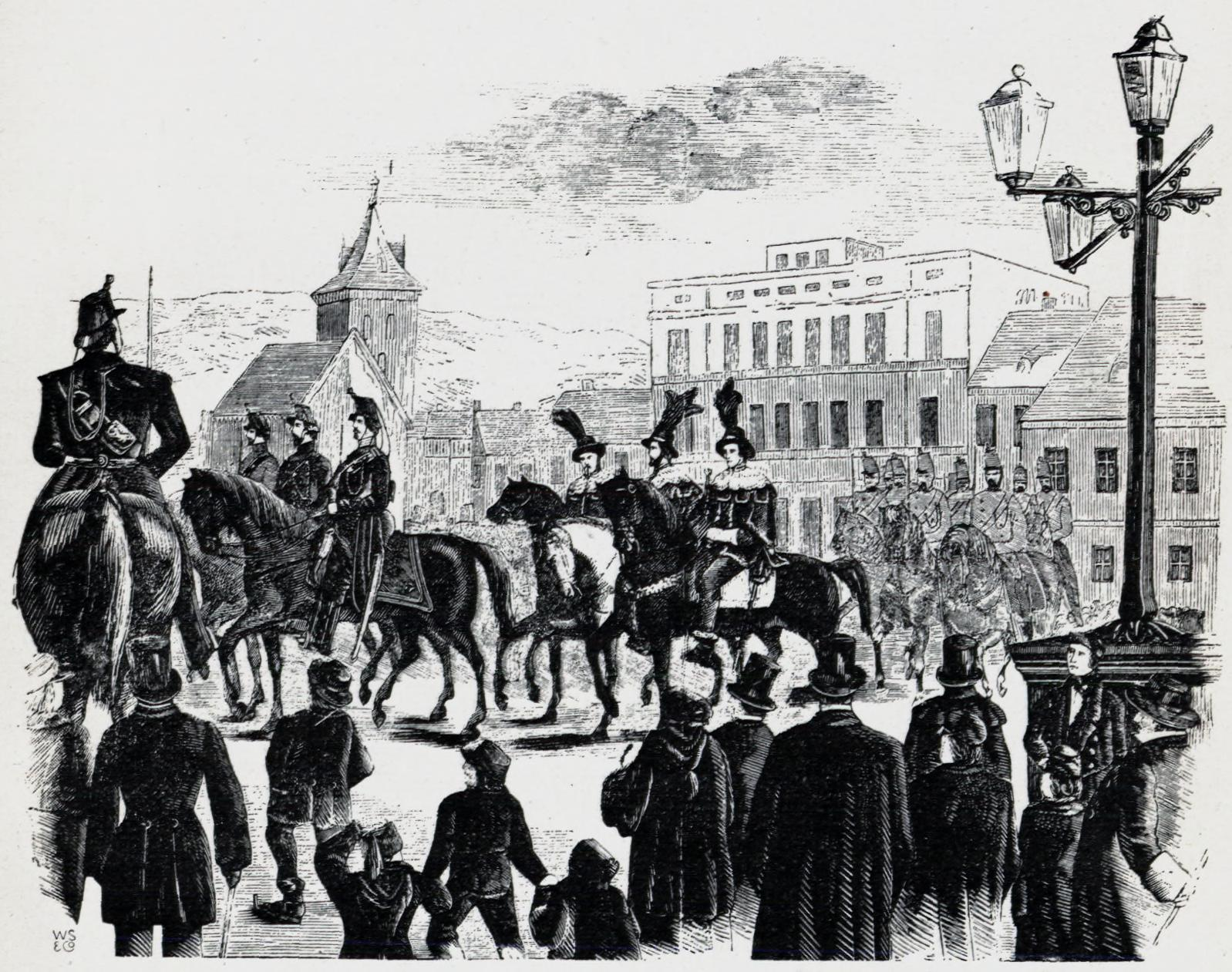 Illustrasjon hentet fra boken "En Christianiensers Erindringer fra 1850- og 60-Aarene" av Nielsen, Yngvar og utgitt av Gyldendal (Kristiania, 1910). Heroldernes Proklamation af Storthingets Aabning 8. februar 1857.